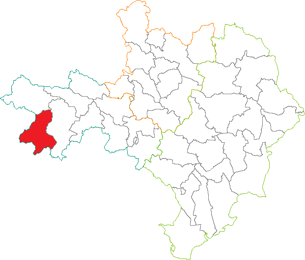 Situation du canton dans le département du Gard (France)